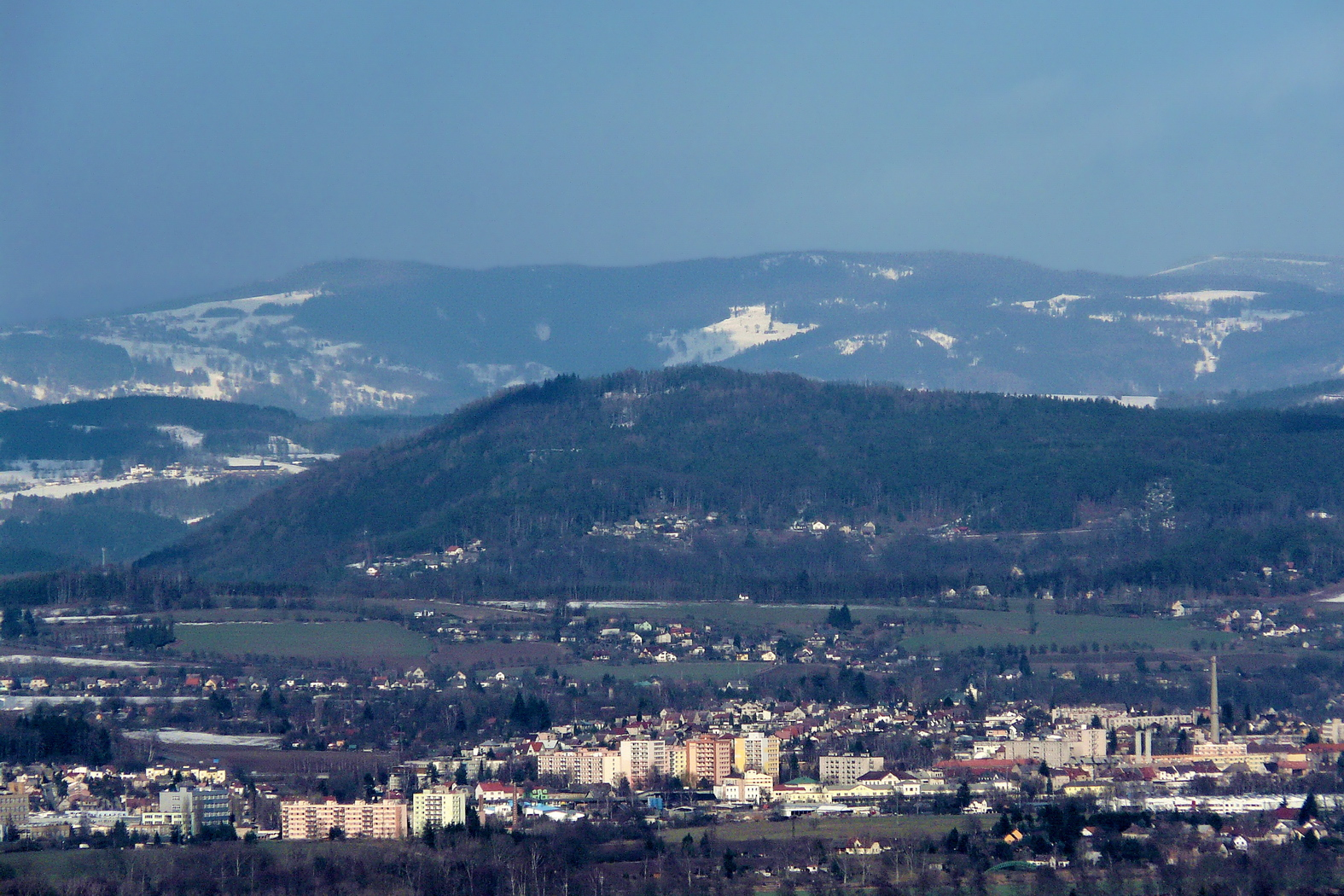 Turnov, vrch Sokol, Jizerské hory z vrchu Mužský